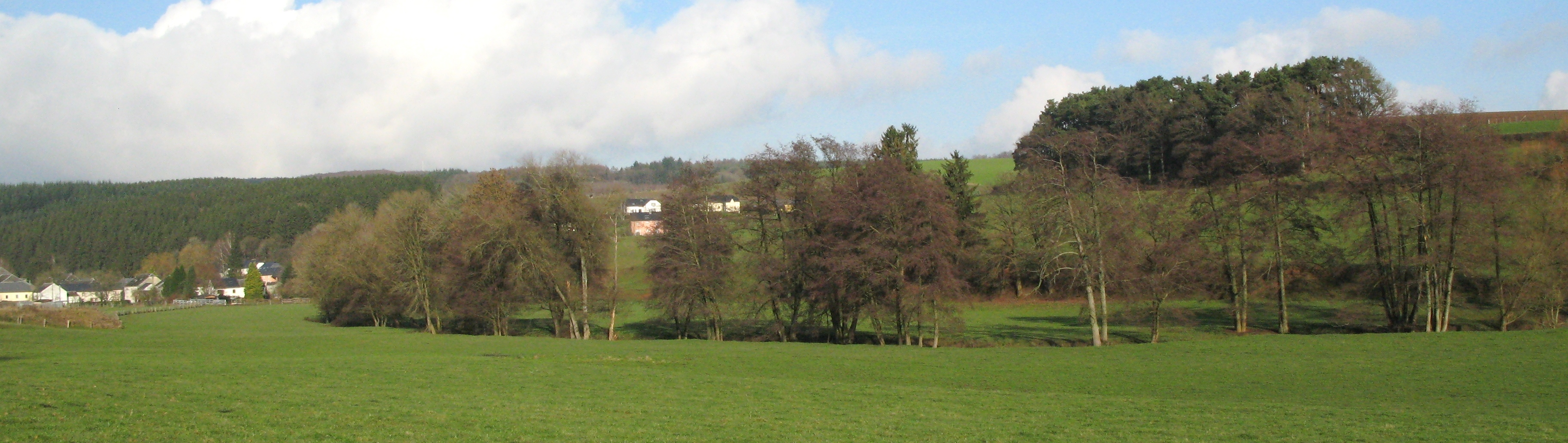 Den Dall vun der Noutemerbaach südlech vun Noutem, lénks am Bild den ëstlechen Deel vun der Uertschaft.